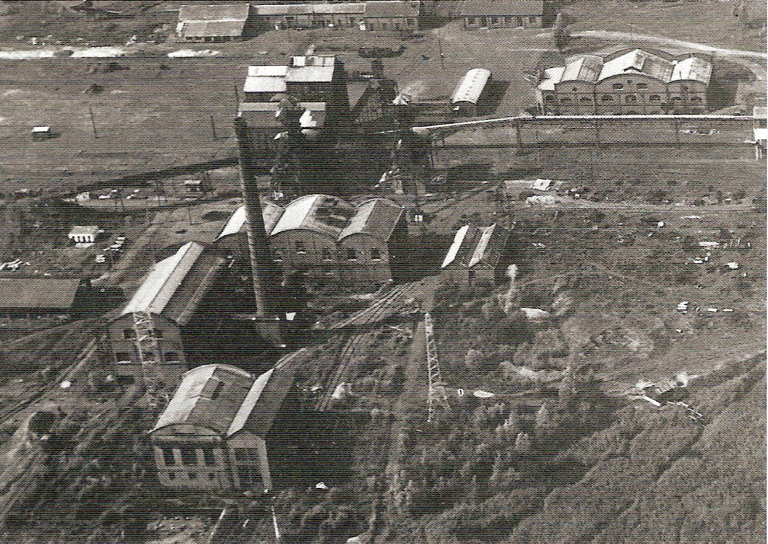 La Fosse Saint Pierre de la Compagnie des mines de Thivencelle était un charbonnage constitué de deux puits situé à Thivencelle, Nord, Nord-Pas-de-Calais, France.